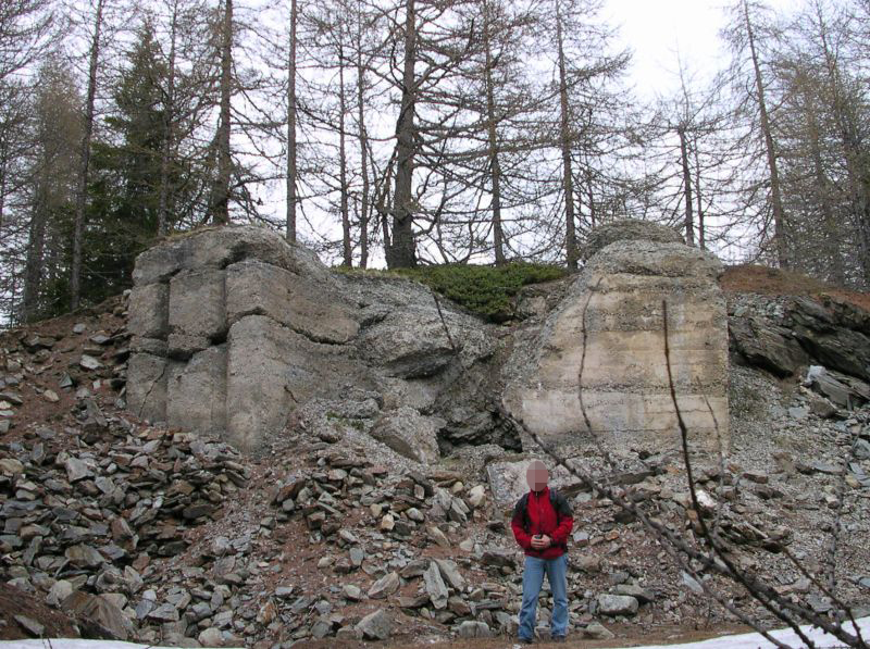 GMN: Le fortificazioni del Colle San Carlo - La fortezza sotto la strada per il Lago d'Arpy a 1970 m. Postazioni di fuoco minate in conseguenza del trattato di pace con la Francia. NB Pe rFondazione Chanoux sono resti della batteria del Belvedere d'Arpy [1]